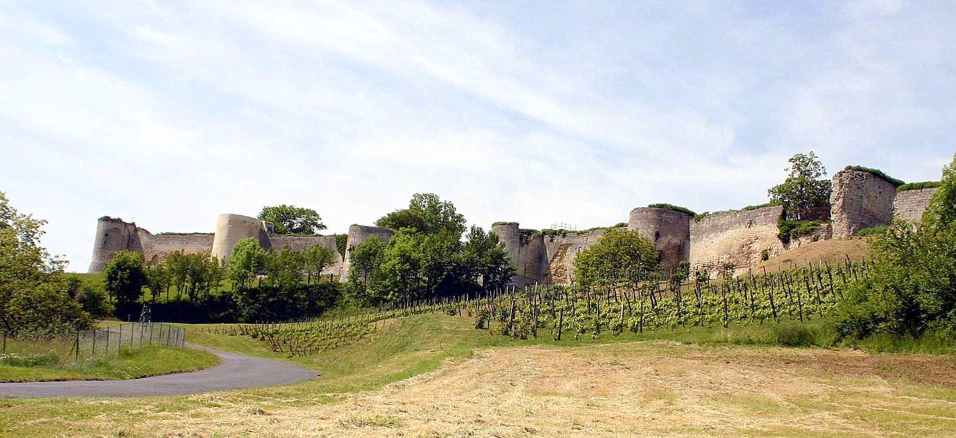 D'Festungsmauere mat de Wéngerten op der Südsäit.